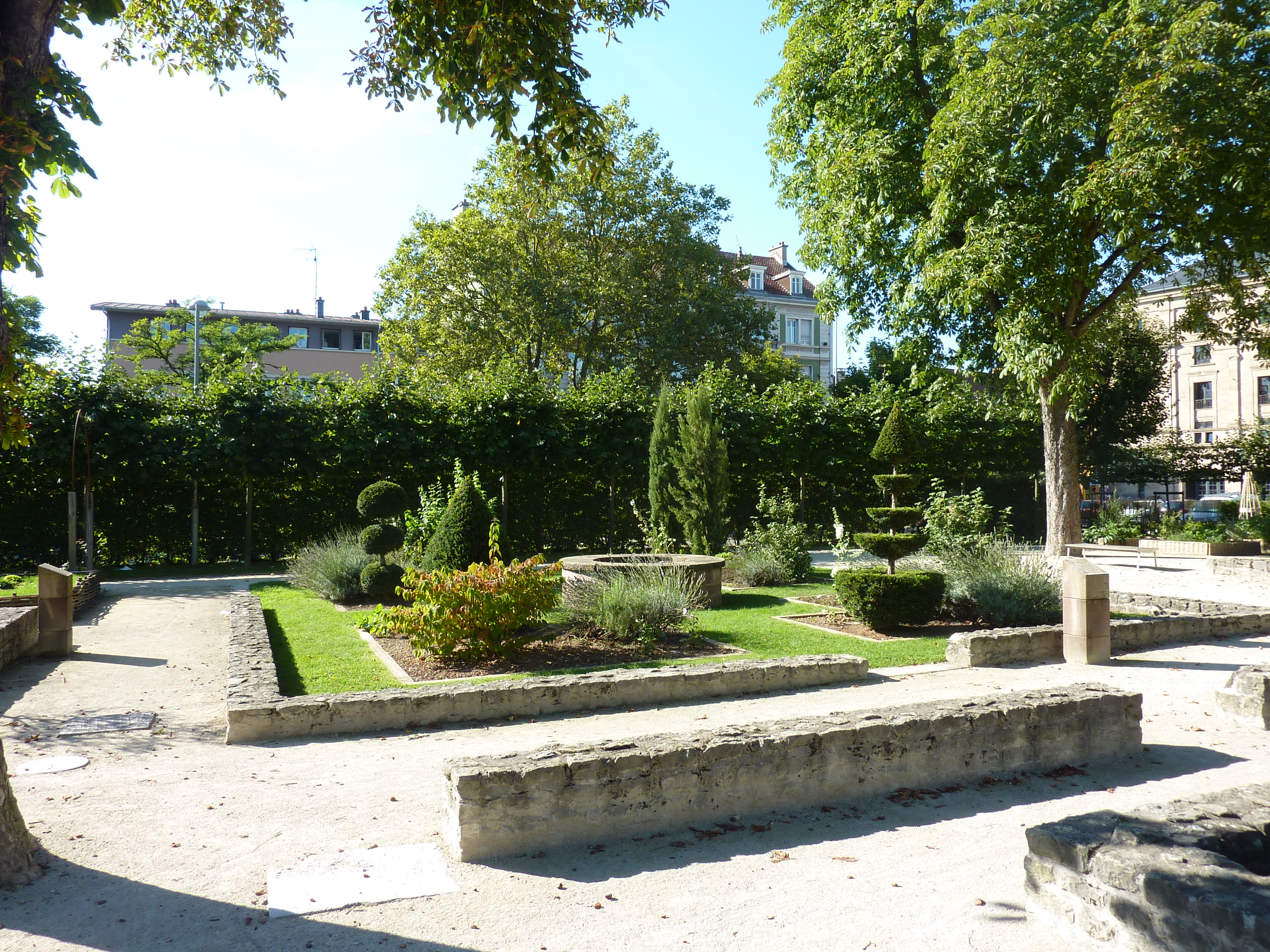 vestige du couvent des capucins